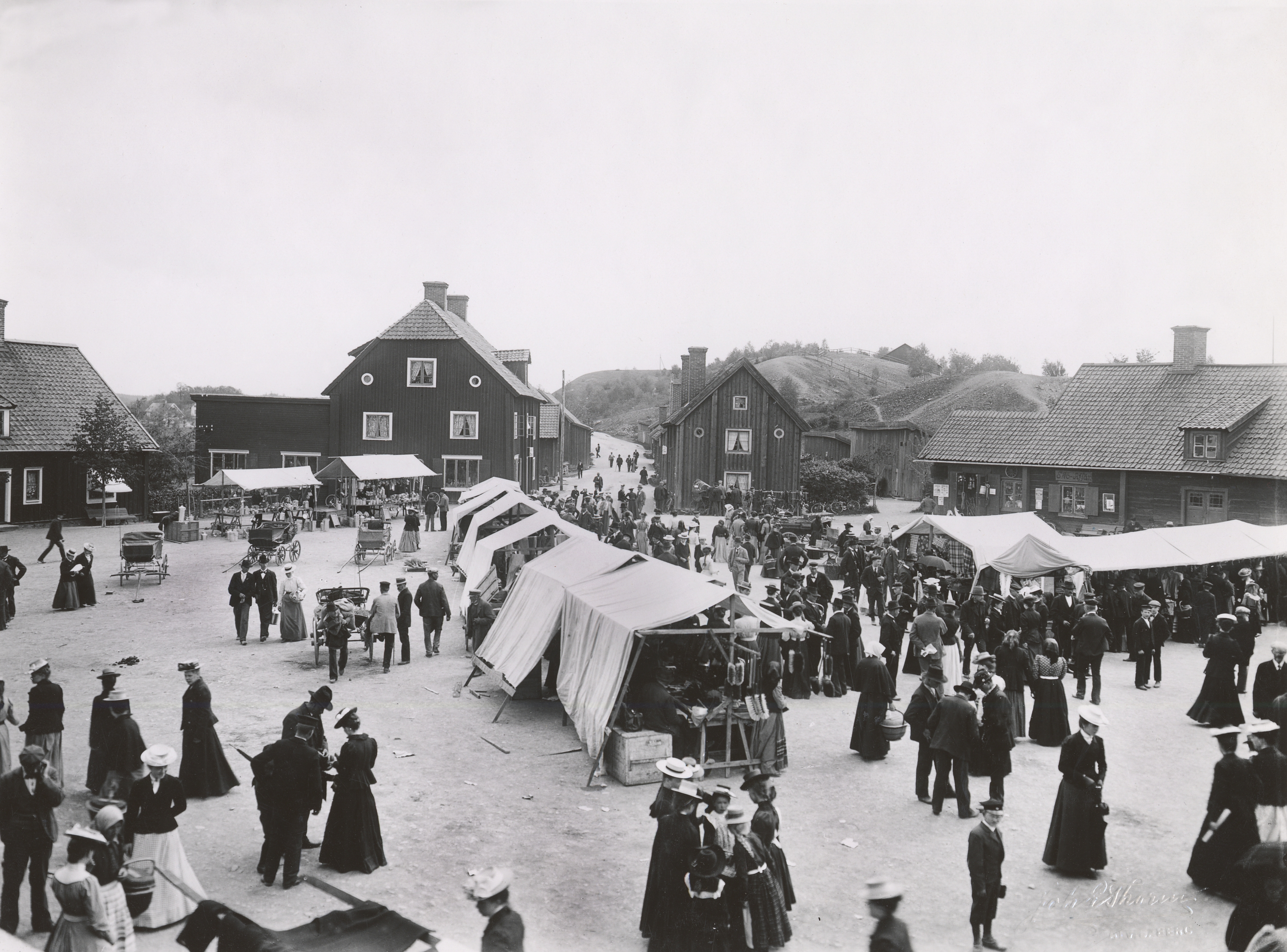 Åtvidaberg. Pingstmarknad ( troligen 1903 ). Foto Joh. E. Thorin Åtvidaberg. Ur Svensk Stad vol. 19.